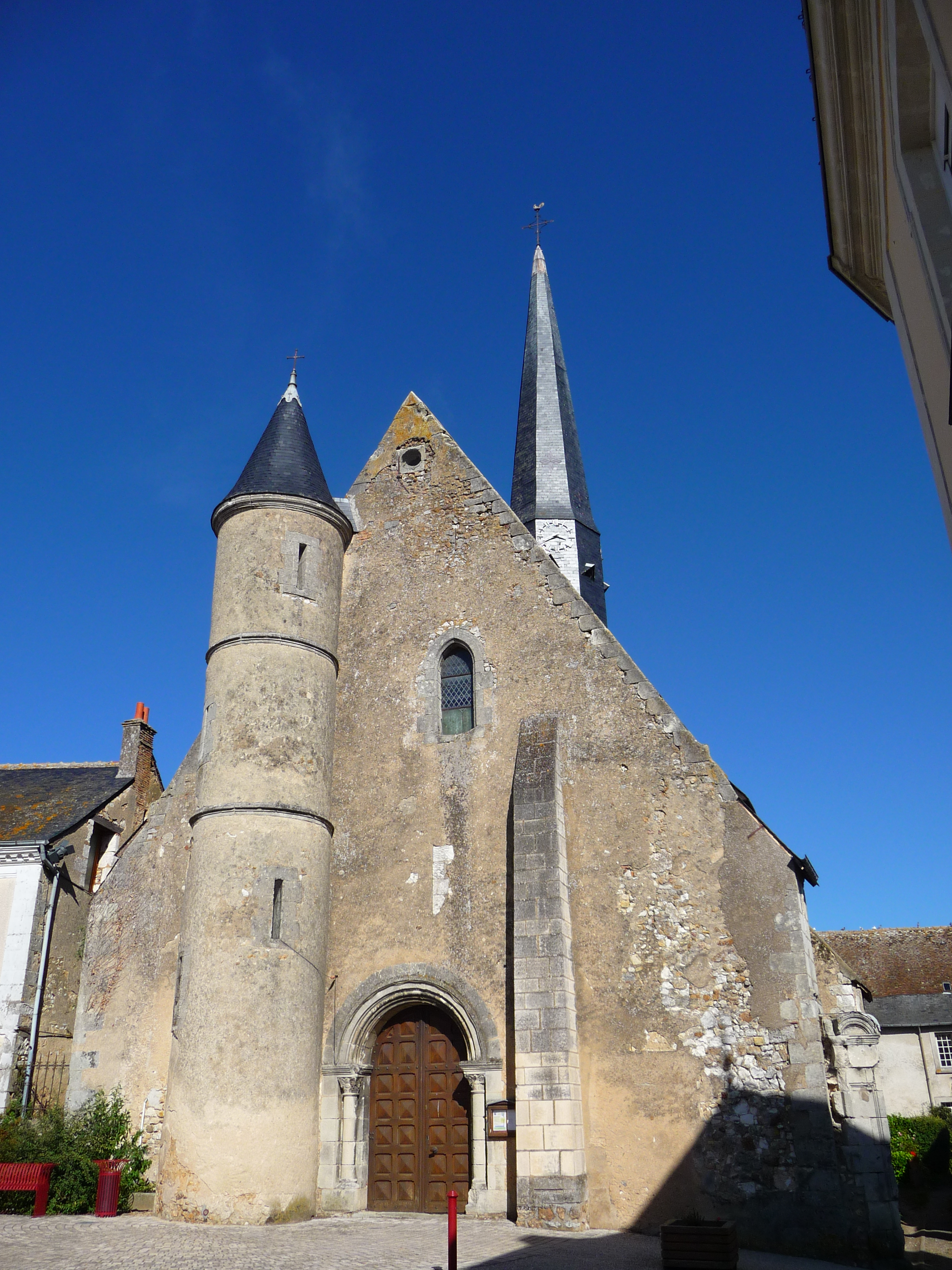 Église Saint-Michel de Souvigné (Indre et Loire)